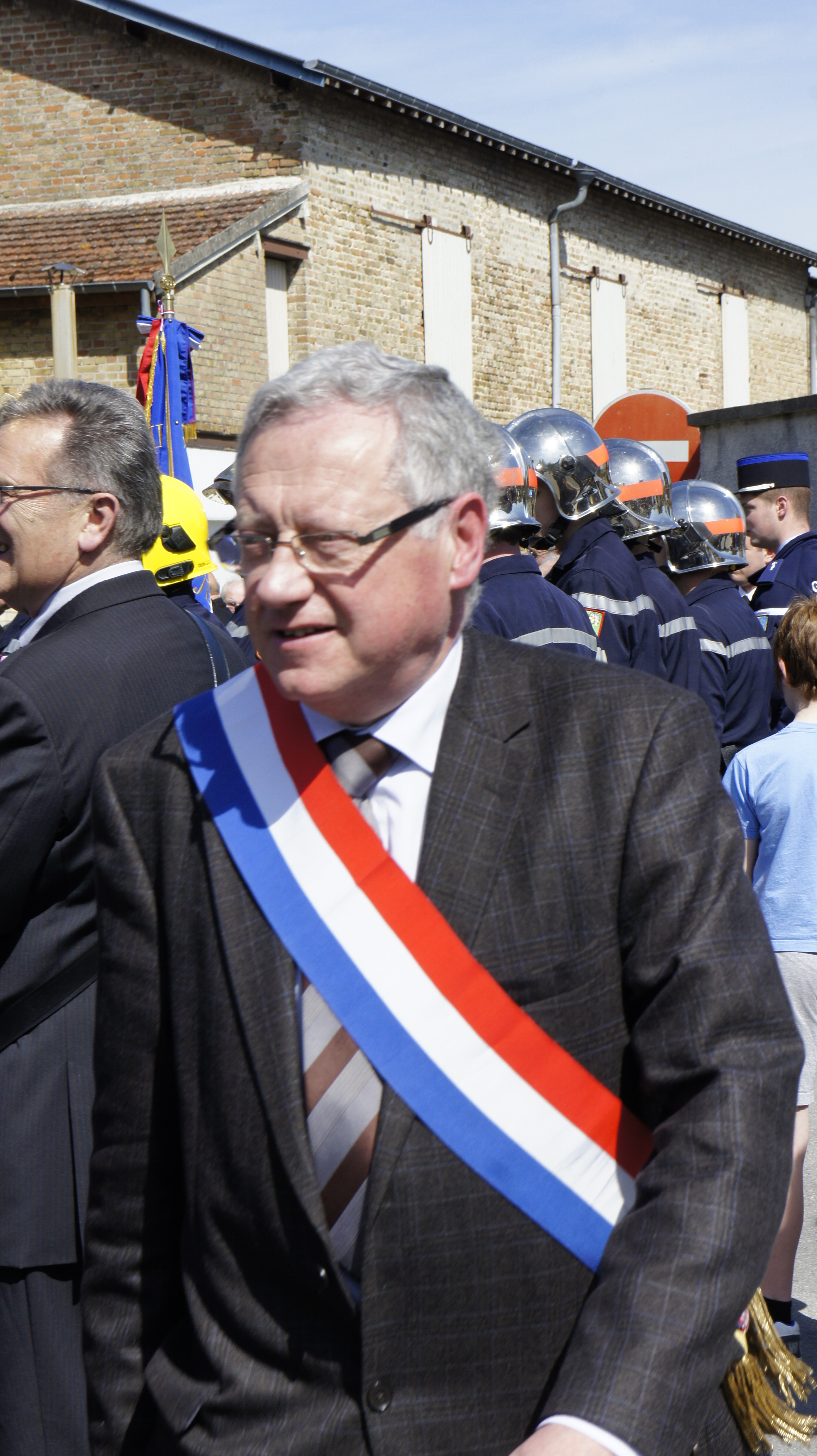 à Juniville .